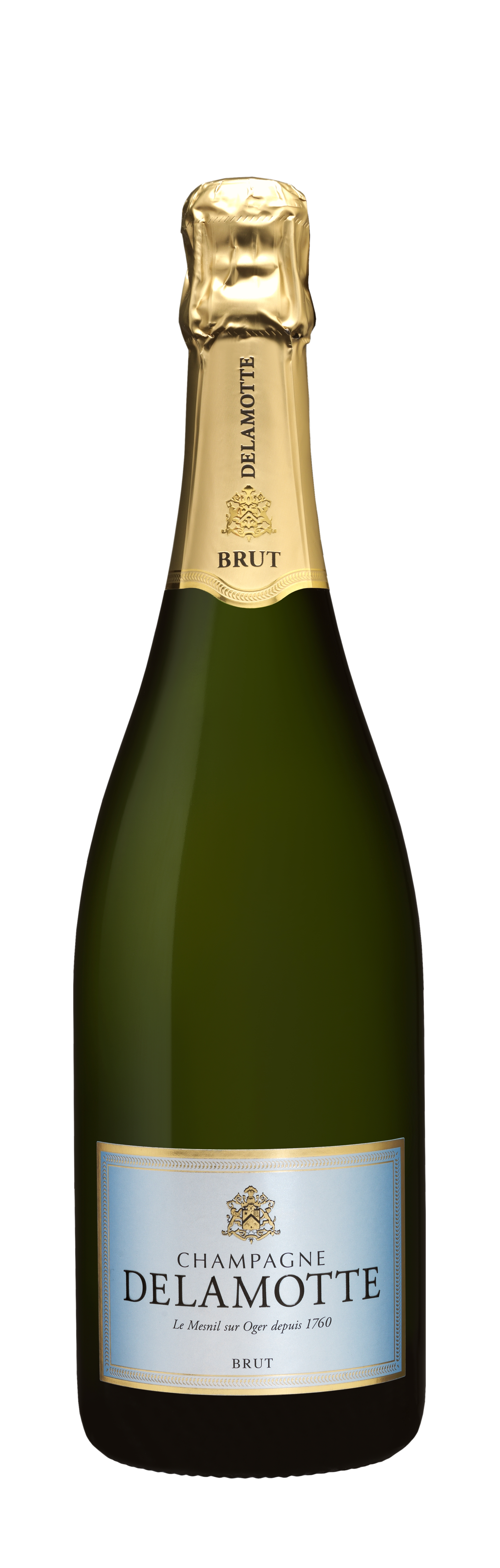 Picard: Bouteille de Champagne Delamotte